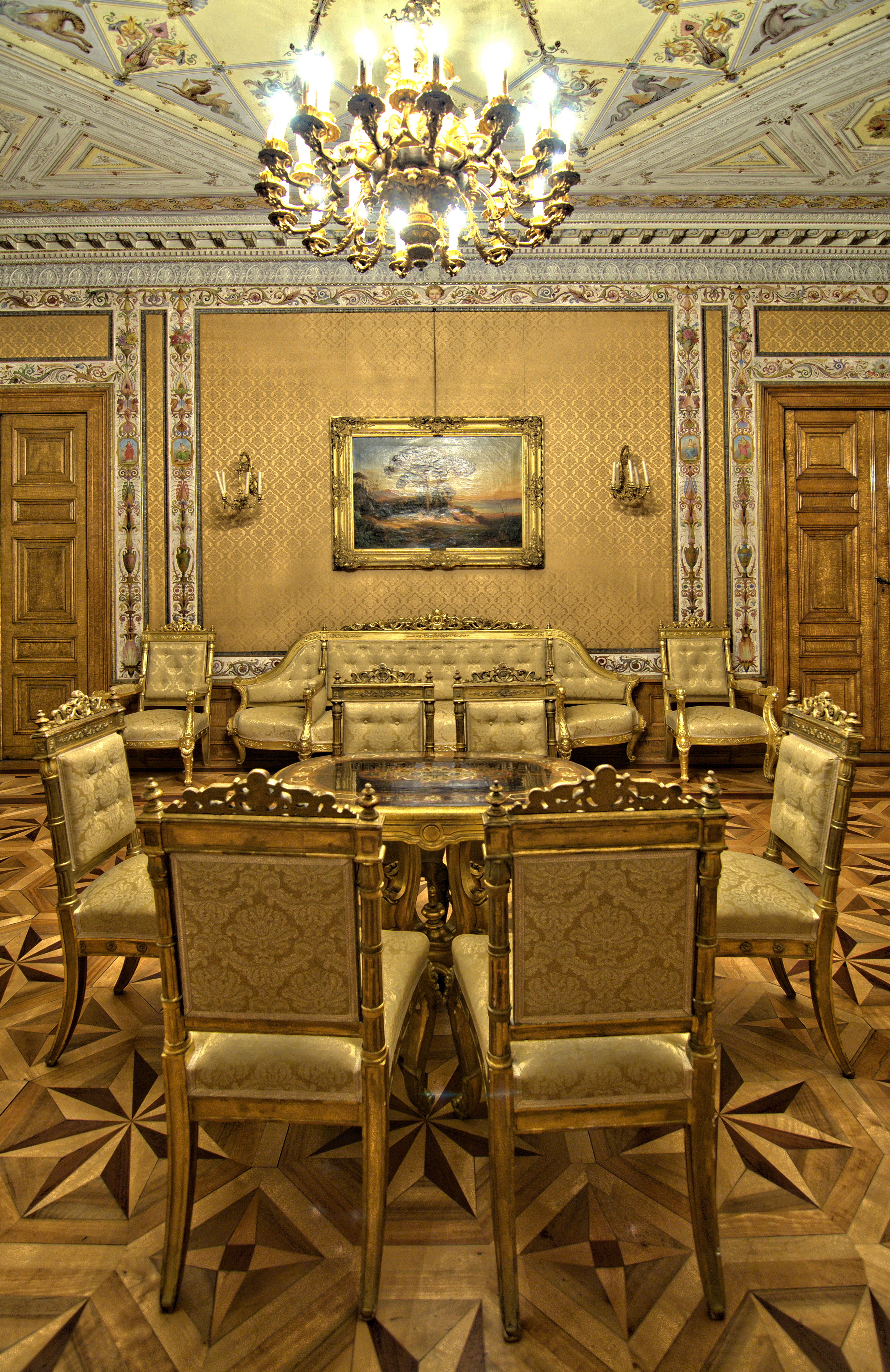 Stadtschloß Wiesbaden Wikipedia im Landtag – Hessen 26.–28. Februar 2013 in Wiesbaden Fragen zur Nachnutzung Wenn Sie Fragen zur Nachnutzung dieses Bildes haben, können Sie sich jederzeit gern an wenden